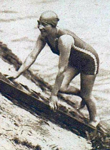 Mme Juliette Prévost-Gardelle, victorieuse de la Traversée de Paris à la nage féminine en 1926.